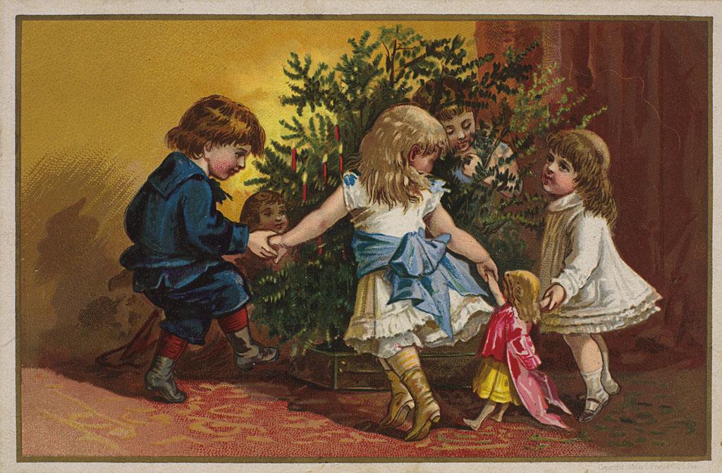 Tittel / Title: Julekort, 1880 Motiv / Motif: Postkort / julekort /overrekkelseskort Dato / Date: 1880 Kunsnter / Artist: ukjent / unknown Utgiver / Publisher: Prang & Co. (Boston) Eier / Owner Institution: Nasjonalbiblioteket / National Library of Norway Lenke / Link: Bildesignatur / Image Number: blds_01757